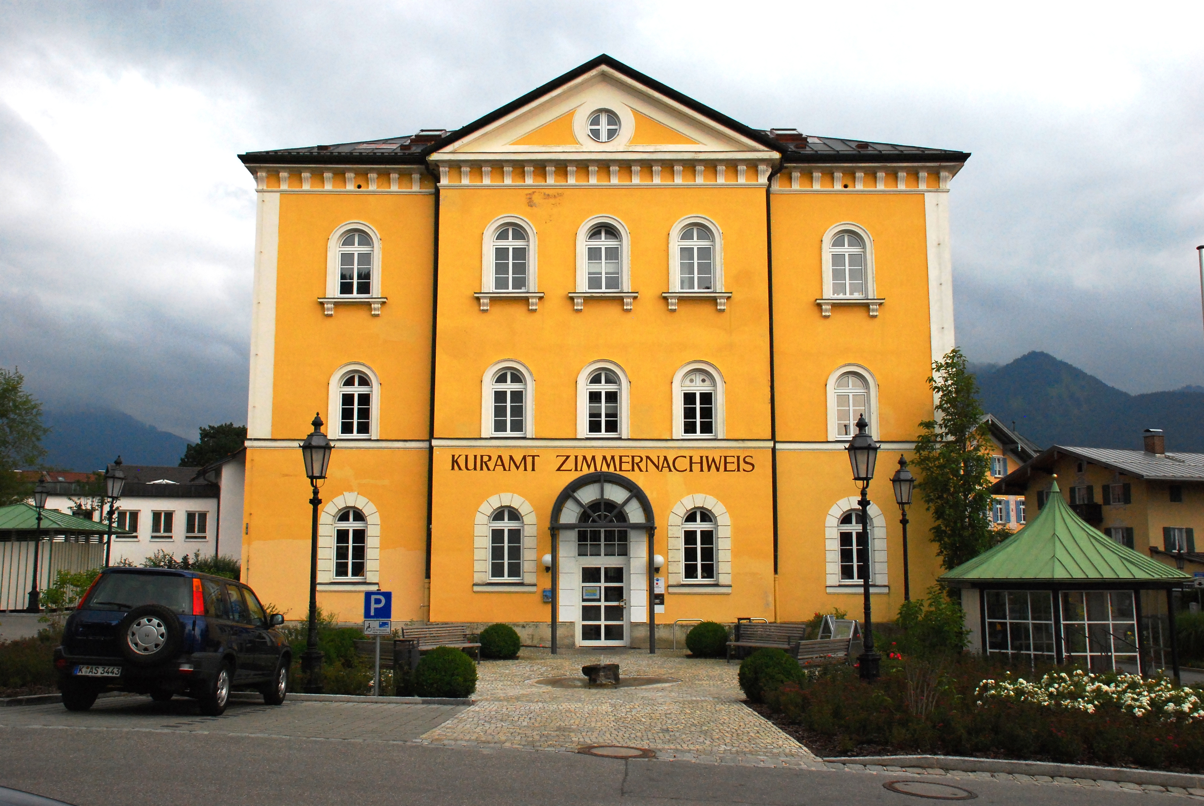 Ehemaliges Gerichtsgebäude, dann Kuramt in der Hauptstraße 2 in Tegernsee, Landkreis Miesbach, Regierungsbezirk Oberbayern, Bayern. Als Baudenkmal unter Aktennummer D-1-82-132-15 in der Bayerischen Denkmalliste aufgeführt. Laut Denkmalliste erbaut in den Jahren 1834 bis 1837 nach Plänen von Daniel Ohlmüller durch Joseph Poschner und Michel Tölzer. Foto gemäß den Voraussetzungen zur Panoramafreiheit von öffentlicher Verkehrsfläche aus aufgenommen.